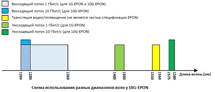 10G-EPON